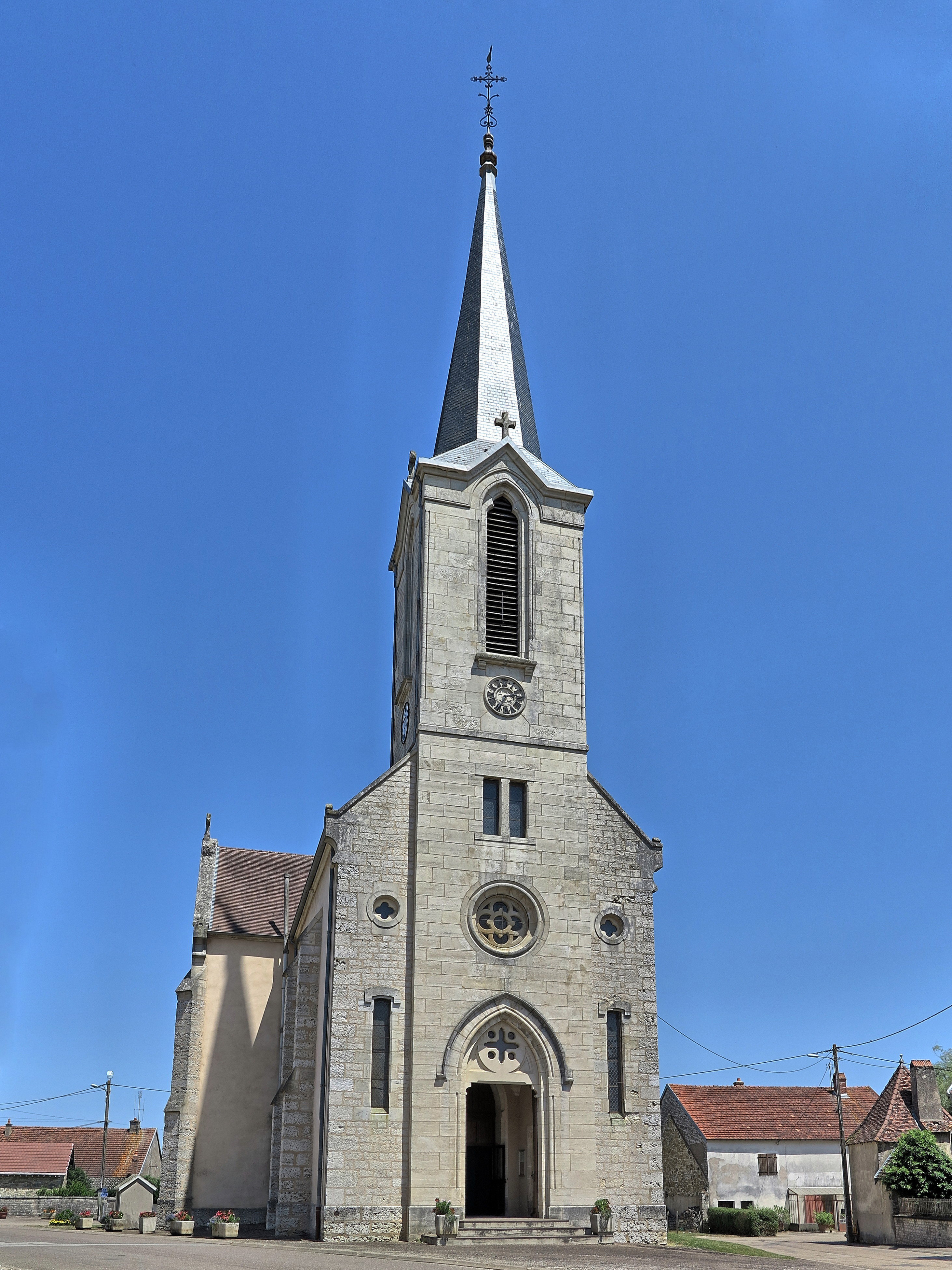 L'église de Velloreille-lès-Choye